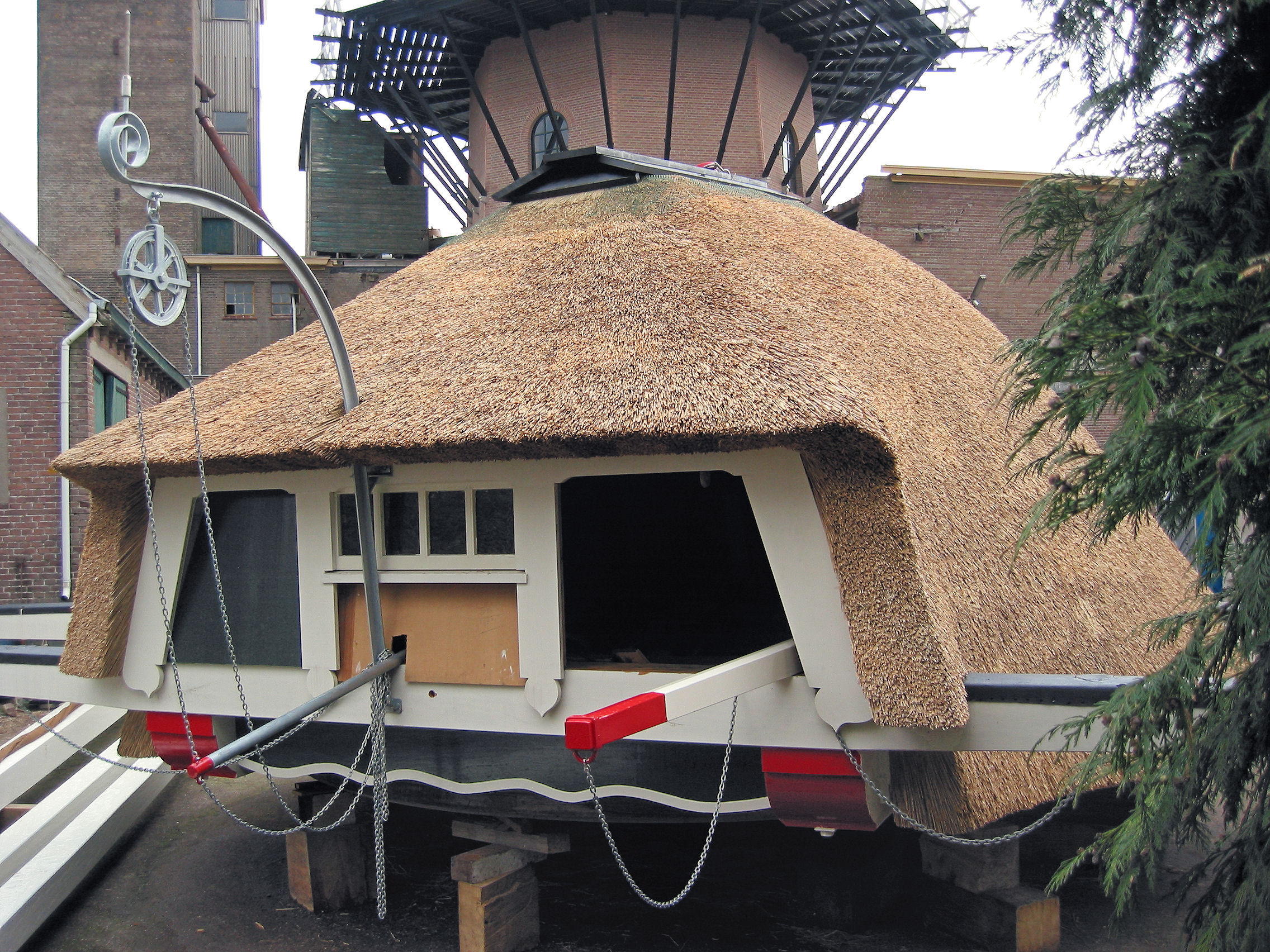 Achterkeuvelens van de Concordia molen te Ede